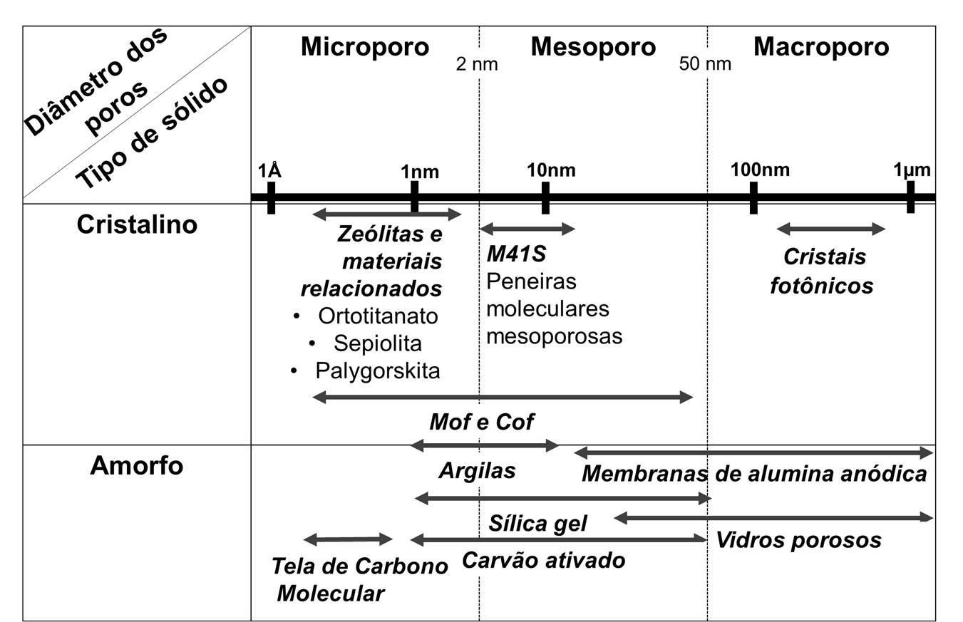 Tamanhos de poros de alguns materiais.